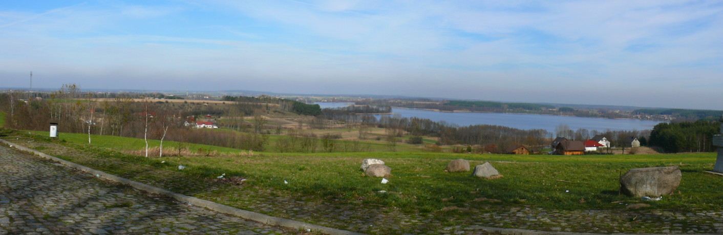 jez. Chrzypskie z punktu widokowego niopodal Łężeczek